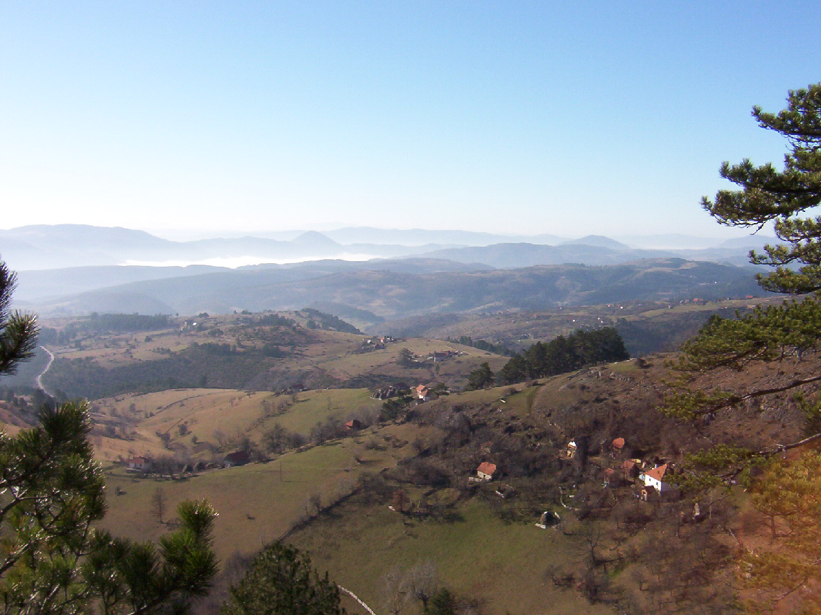 Панорама